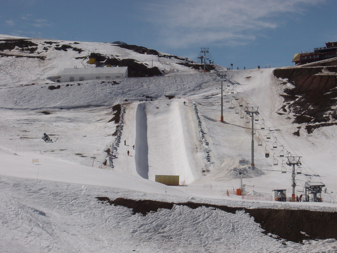 Superpipe in Valle Nevado / Chile